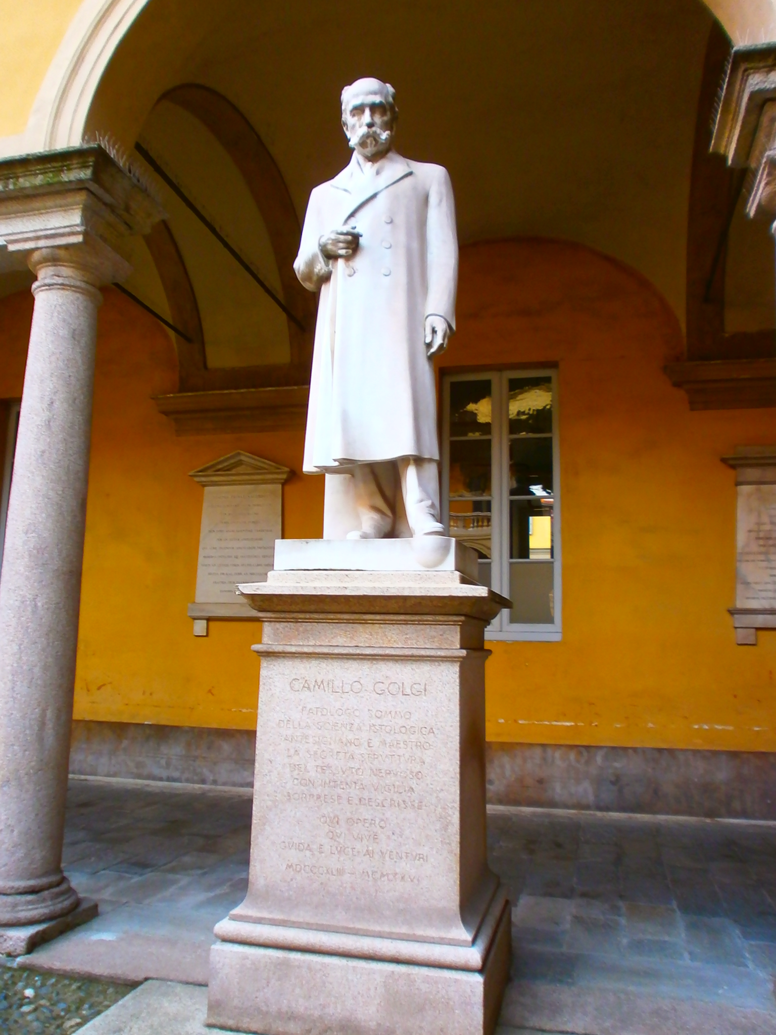 Statua di Camillo Golgi - Cortile delle statue, Università di Pavia.